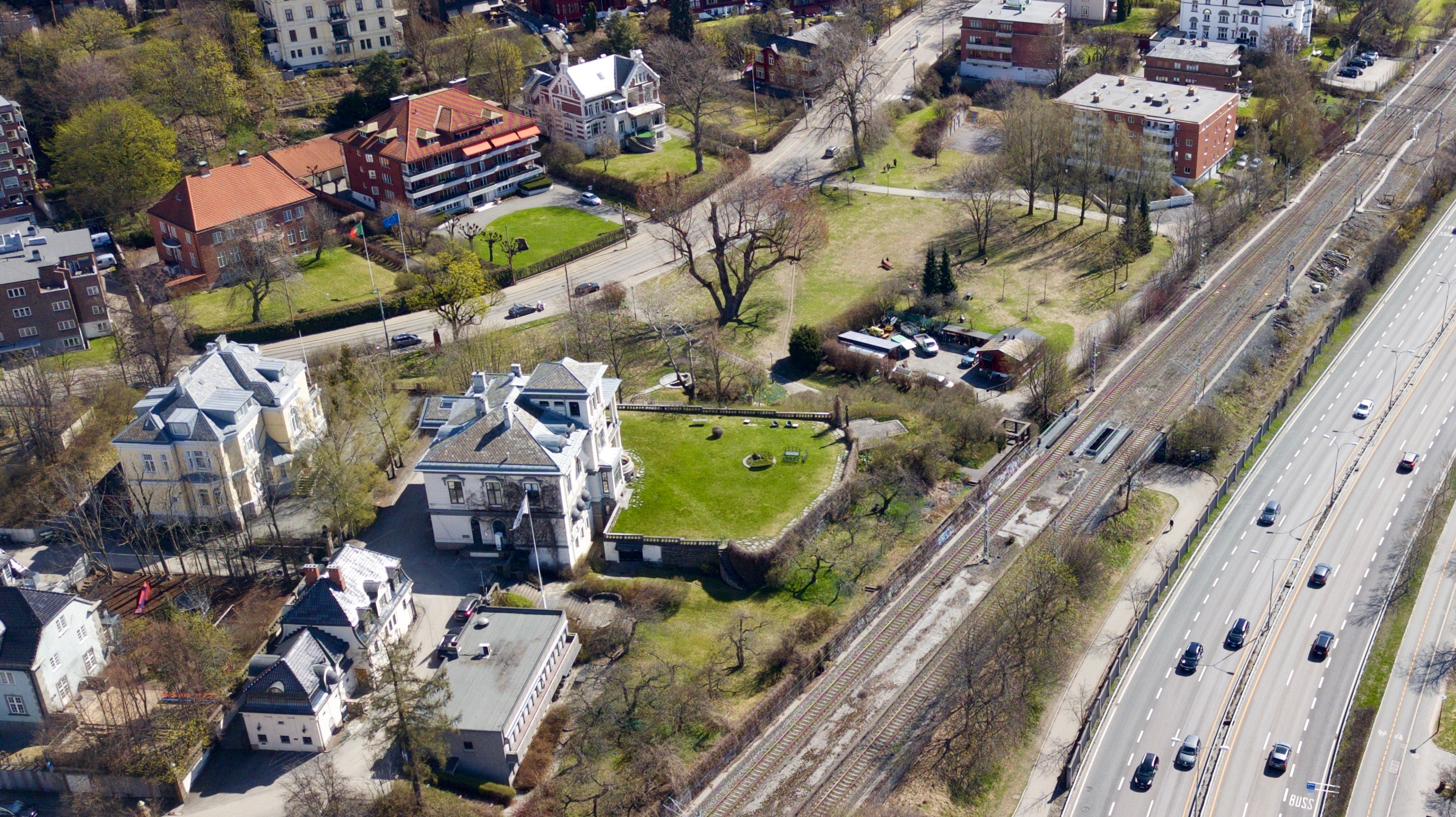 Skarpsnoparken i Oslo.